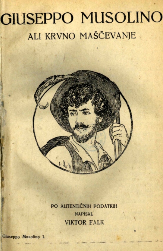 Giuseppo Musolino, naslovnica romana